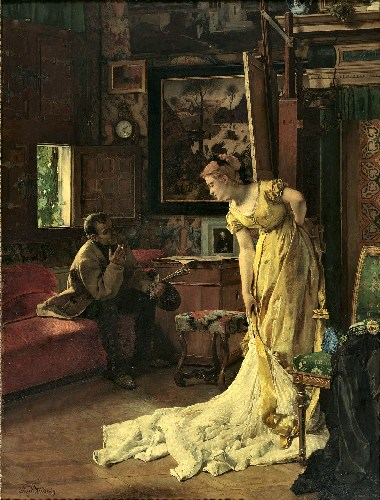 Das Atelier